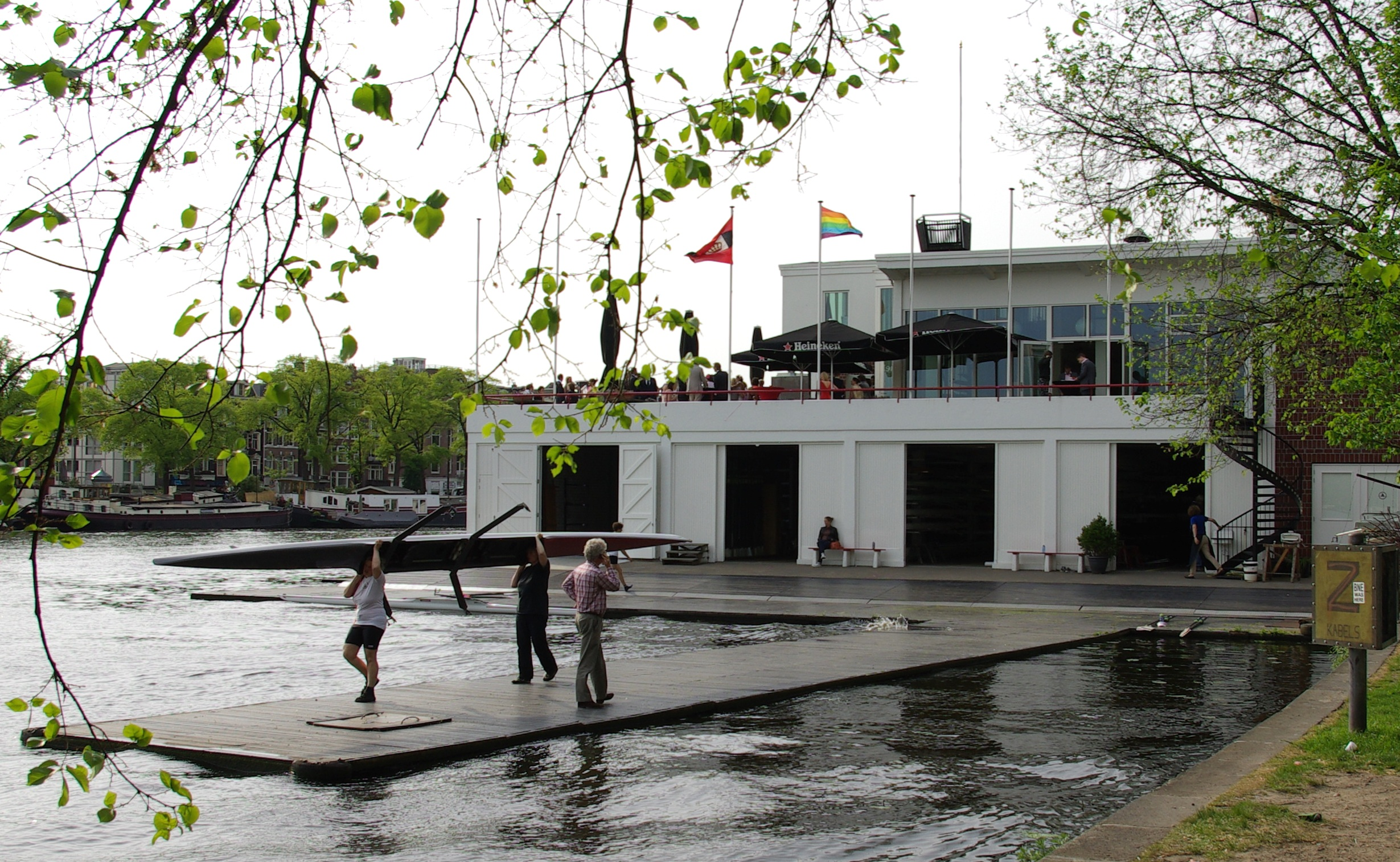 KARZV De Hoop in Amsterdam. (1950-1952, architect: Auke Komter)